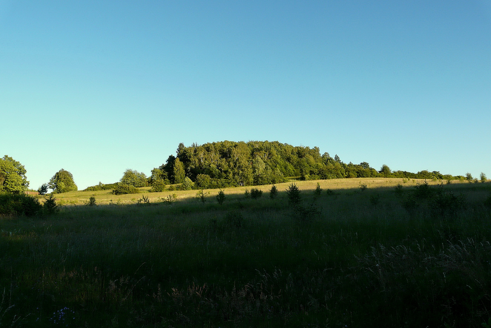 Vrchol Puchavec od severozápadu